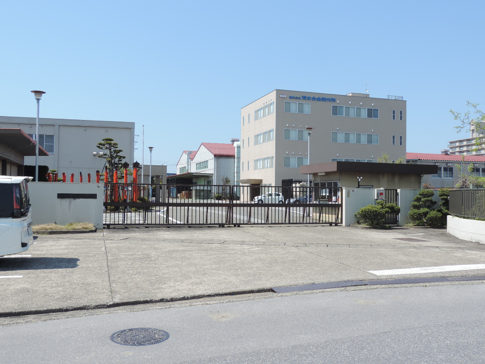 清水合金株式会社本社（滋賀県彦根市）